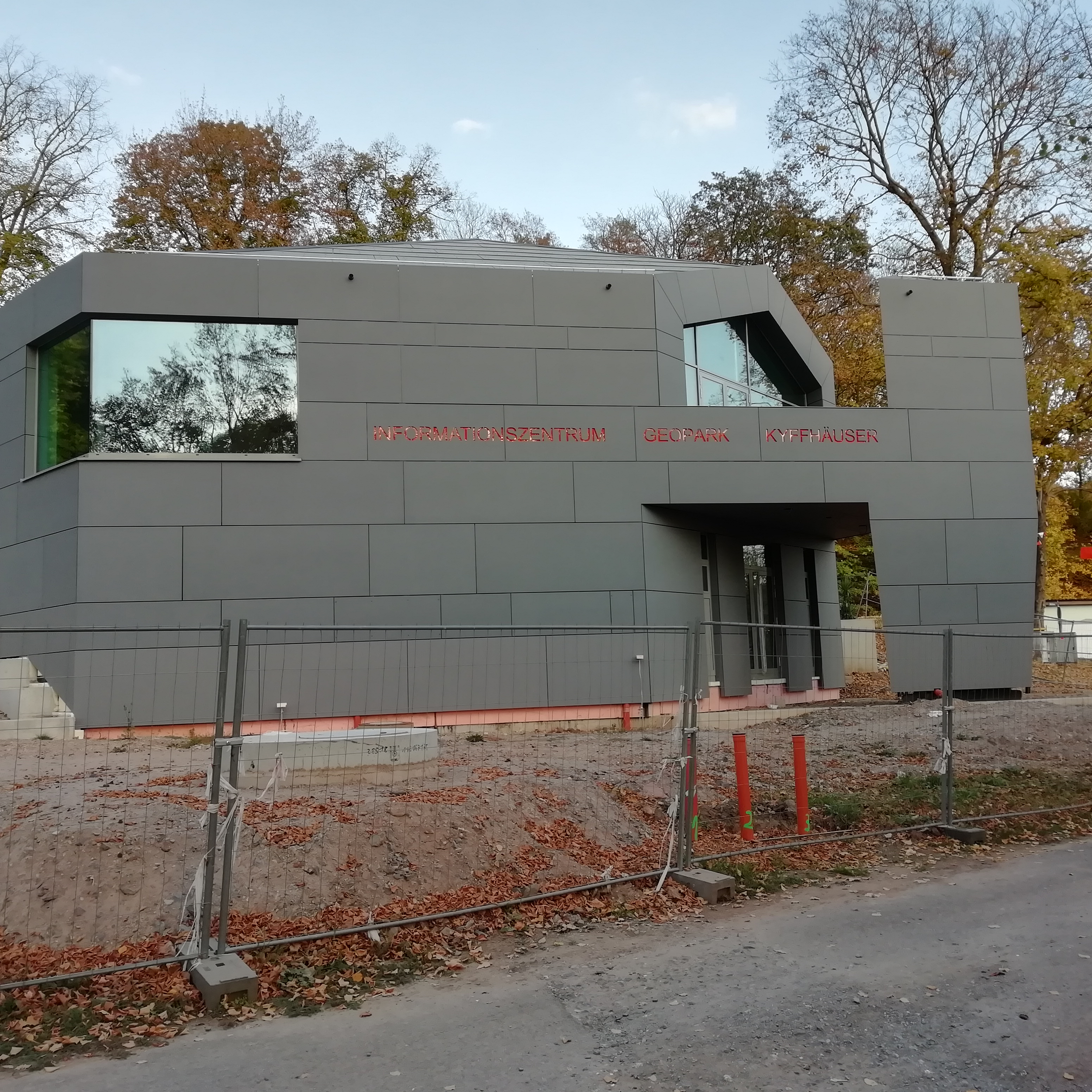 Informationszentrum unterhalb der Barbarossahöhle im thüringischen Kyffhäuserkreis.